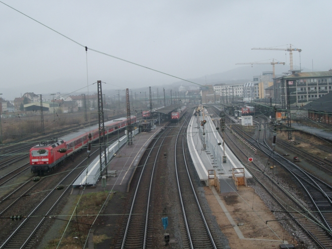 Der Bahnhof Aschaffenburg wird renoviert.